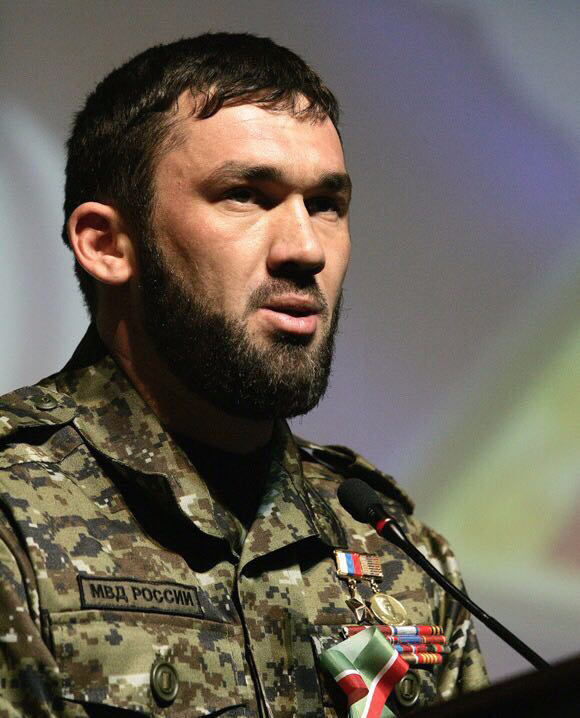 Магомед Даудов Герой России, полковник полиции. (2009 год) This file, which was originally posted to was reviewed on 1 June 2017 by the administrator or reviewer Daphne Lantier, who confirmed that it was available there under the stated license on that date.